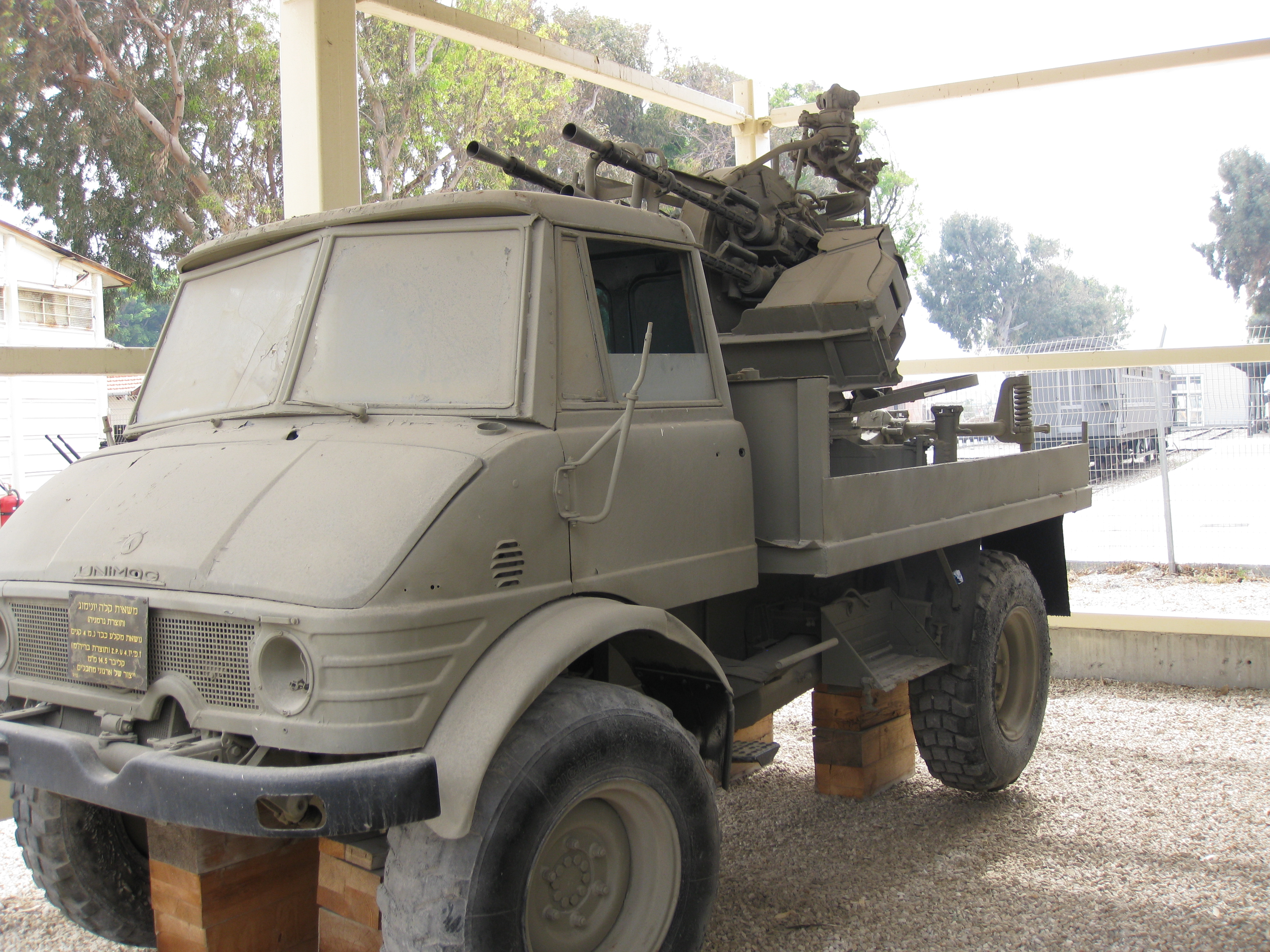 Batey HaOsef Museum מוזיאון בתי האוסף